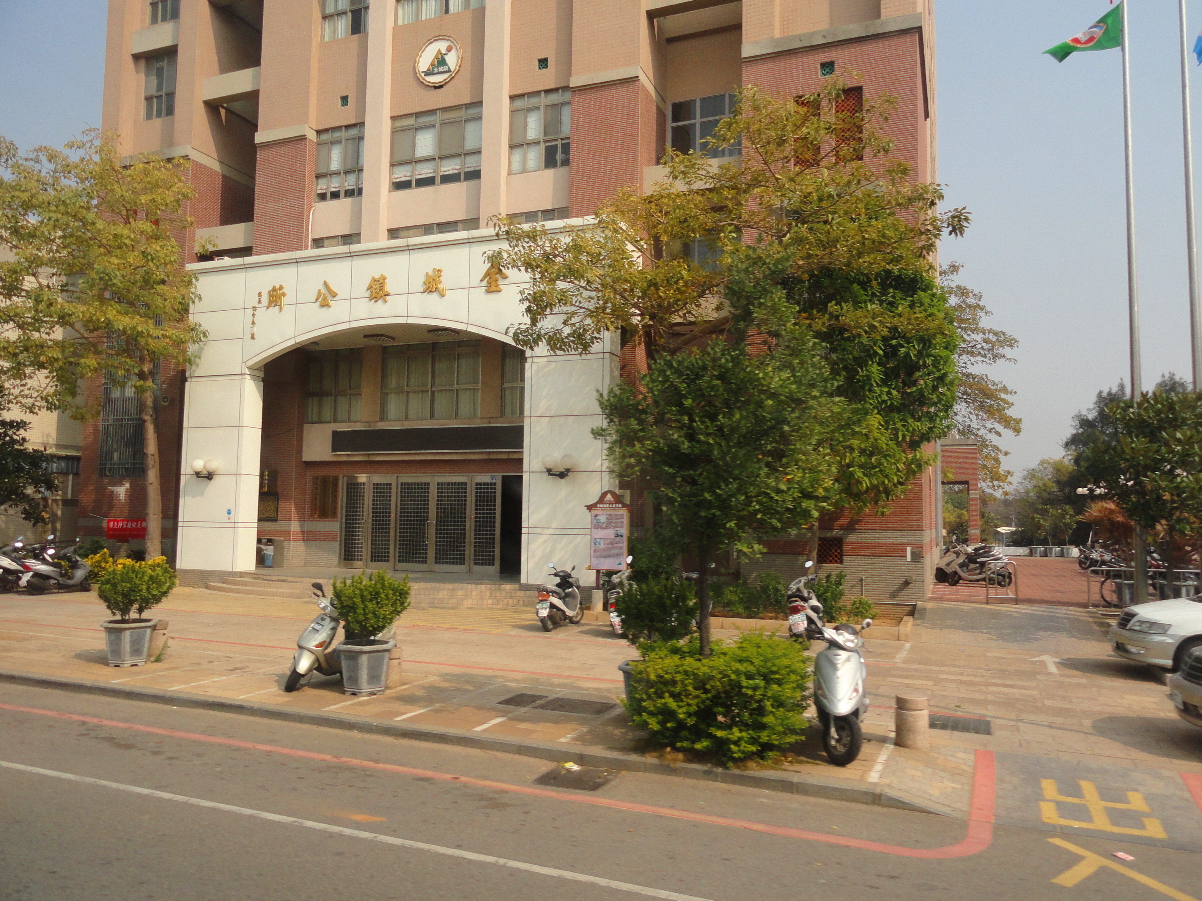 金门县金城镇公所